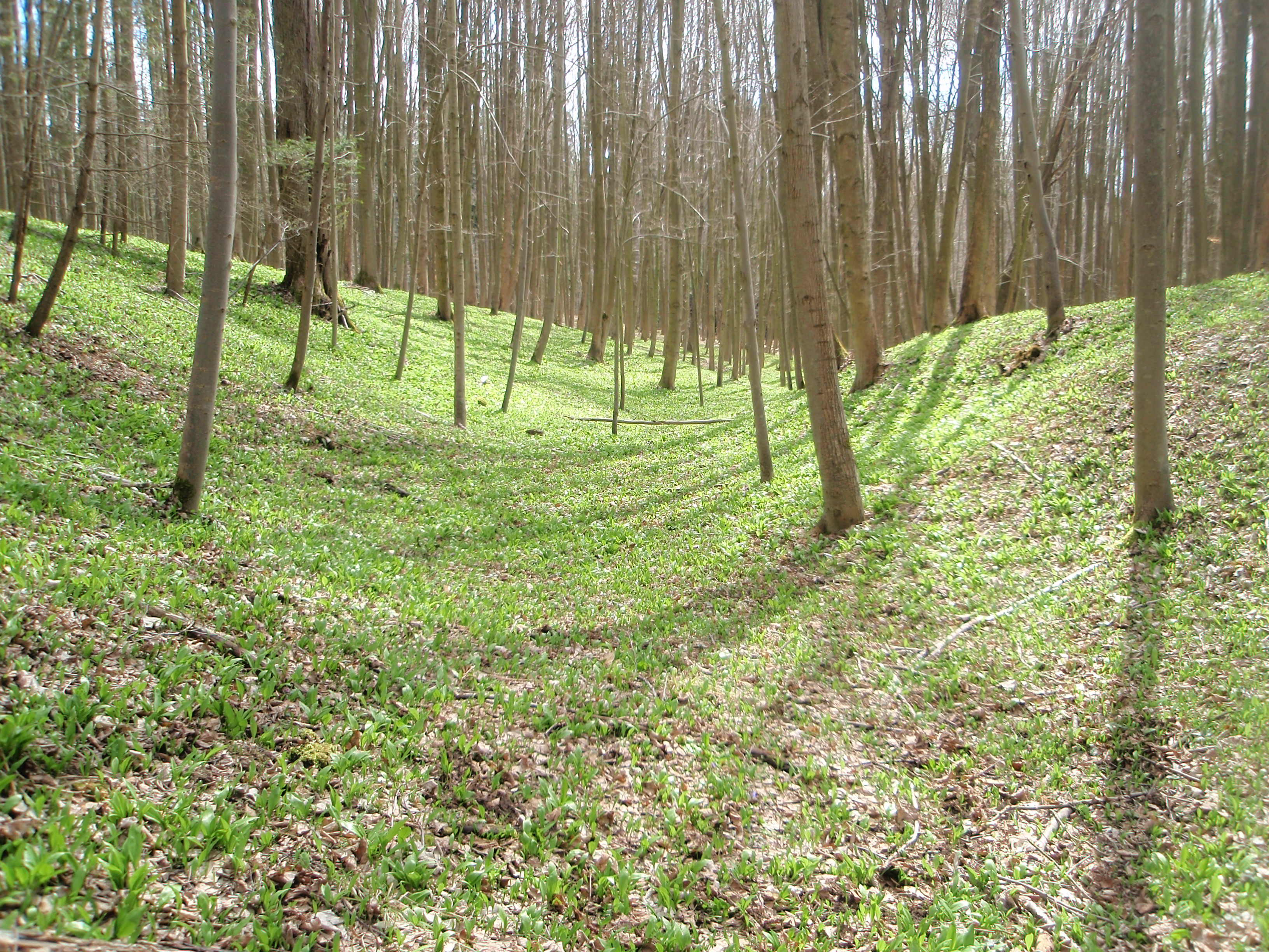 PR Mutenská obora